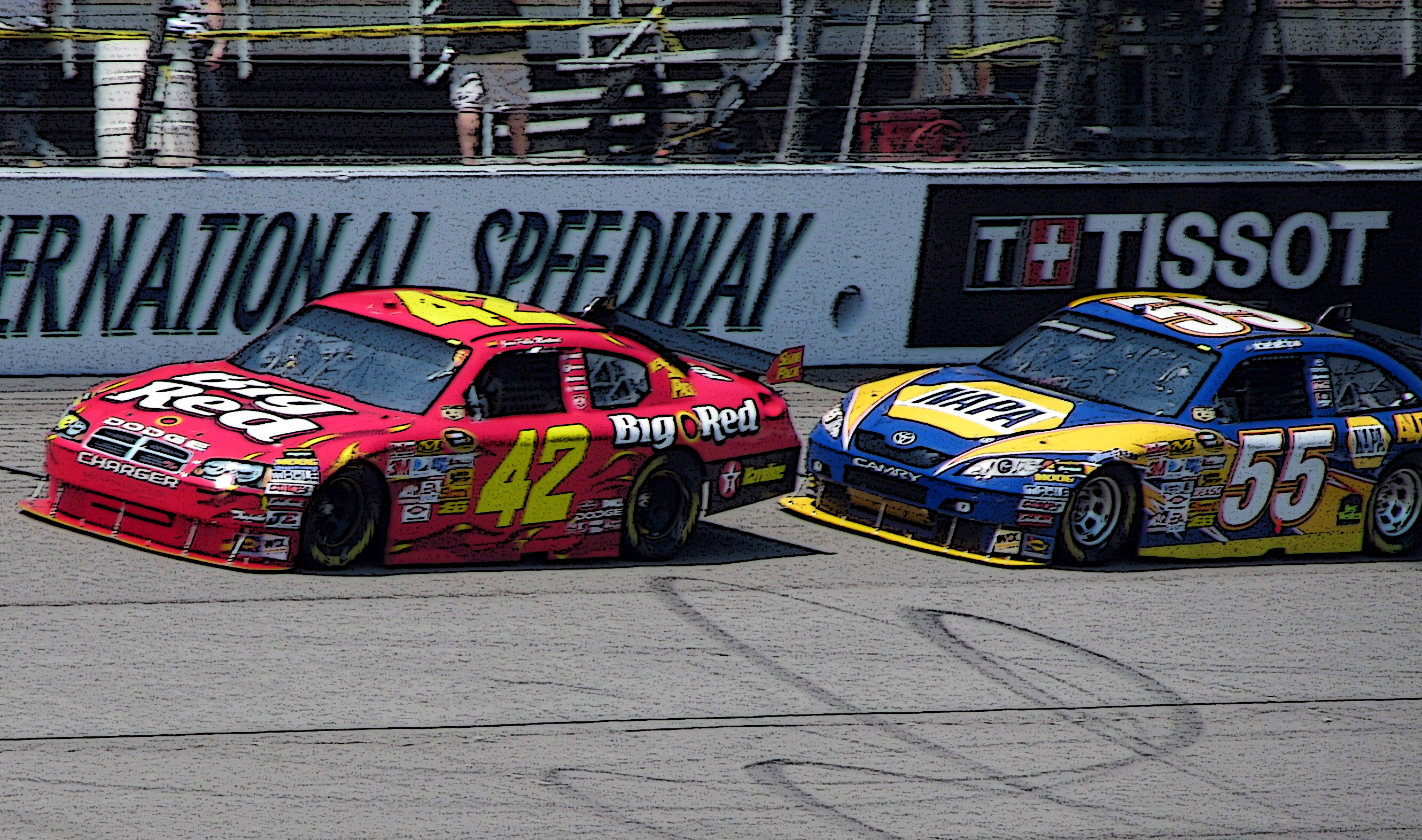 NASCAR - June 14, 2008